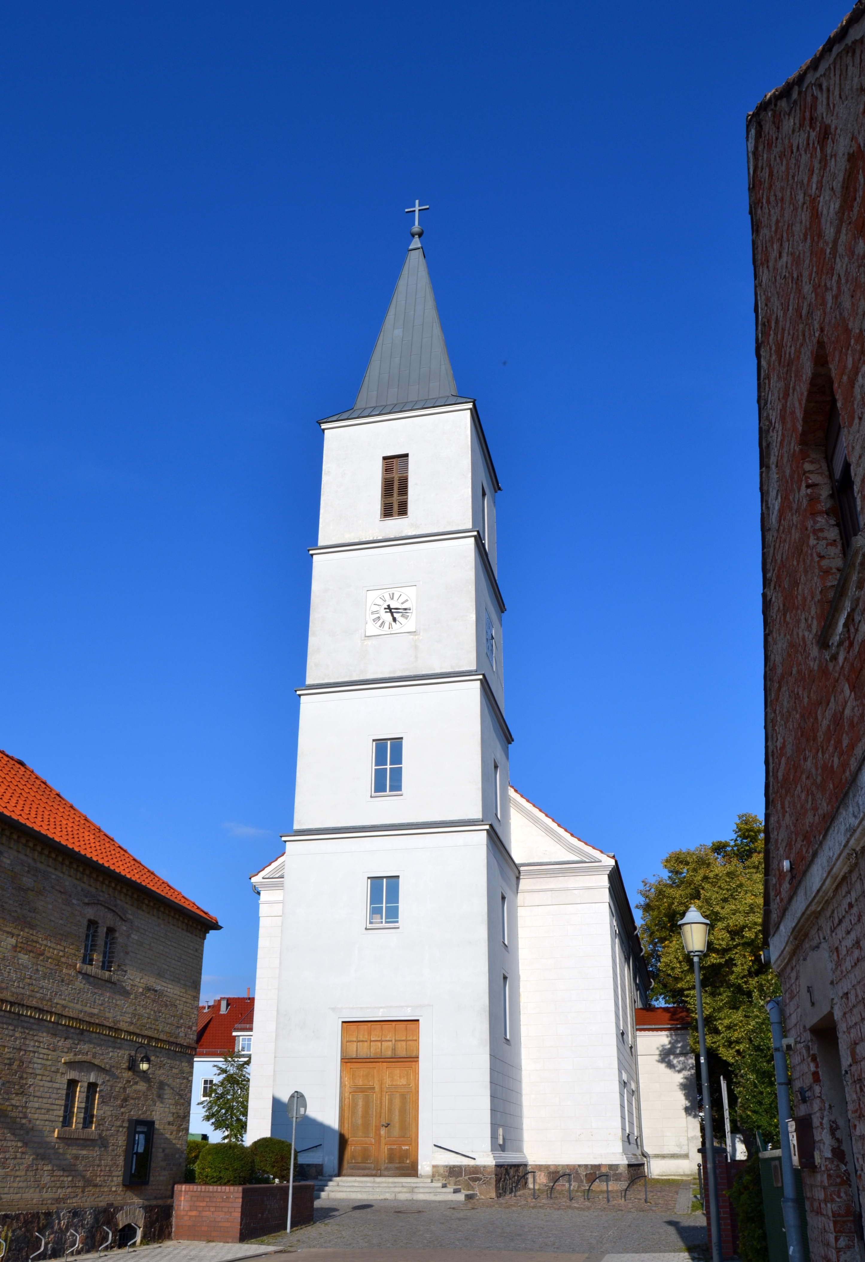 Evangelische Stadtpfarrkirche St. Marien am Puschkinplatz in Seelow; sie wurde von 1830 bis 1832 erbaut. Der Vorgängerbau war eingestürzt. Im Frühjahr 1945 wurde der Turm gesprengt, das Schiff beschädigt und das Innere brannte aus.